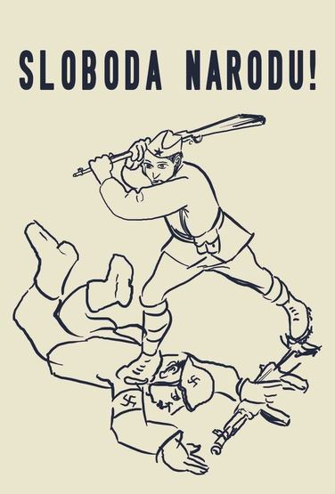 Propagandni plakat hrvatskih partizana